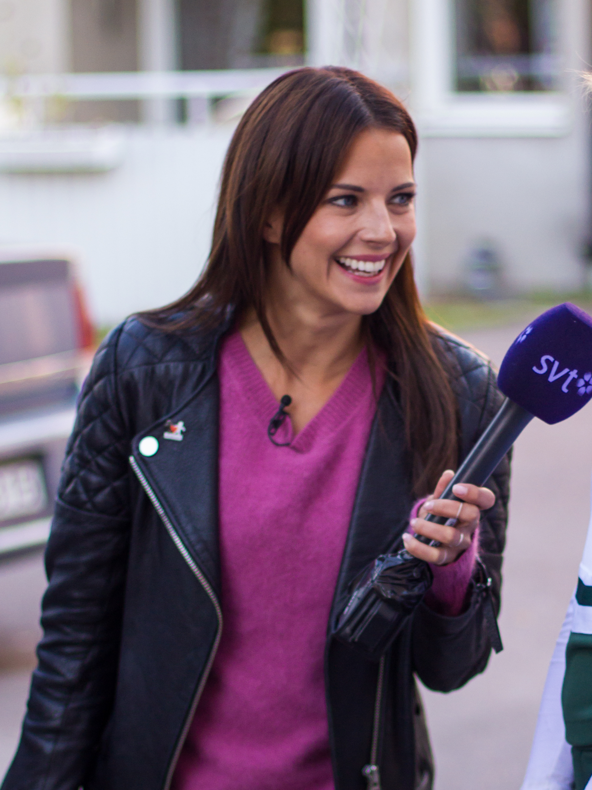 Malin Olsson på reportage för Världens barn 2013, i Hedemora, Sverige.